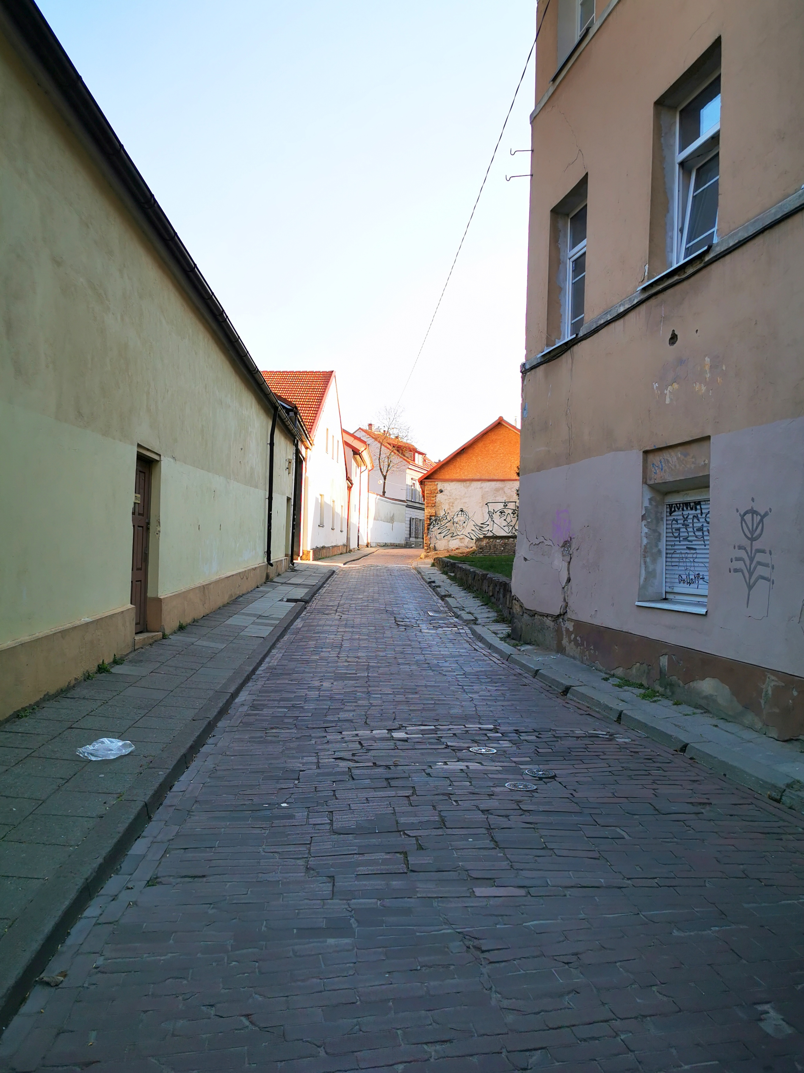 Šiltadaržio gatvė